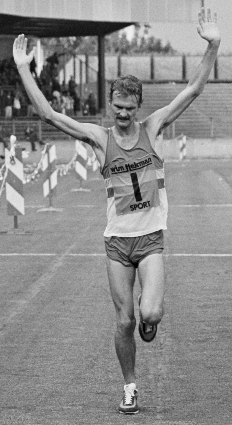 Internationale marathon Enschede 1979, tevens Nederlands kampioenschap. Finish Kirk Pfeffer (VS)